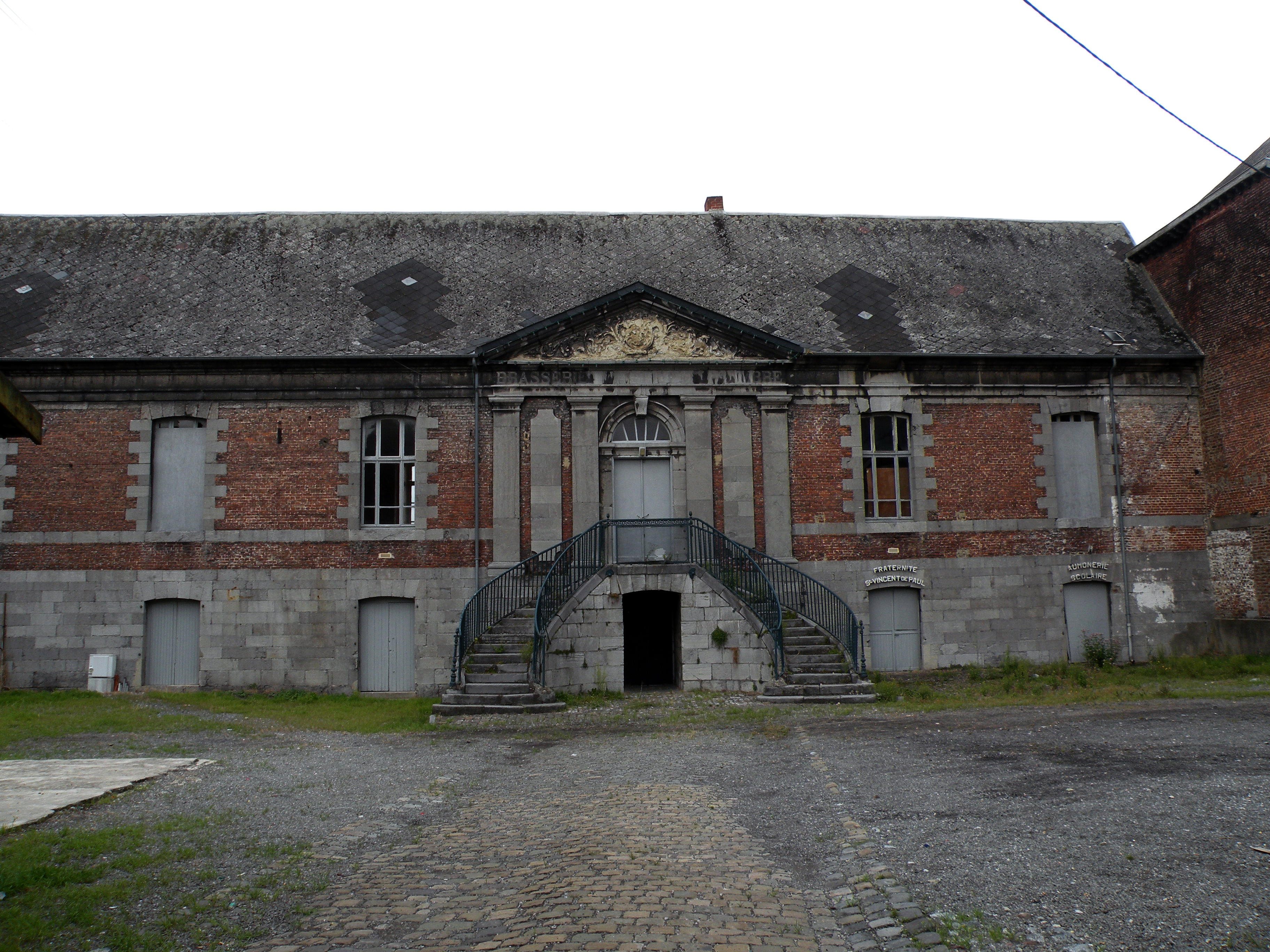 ancien batiment de l'abbaye d'Hautmont, nord france